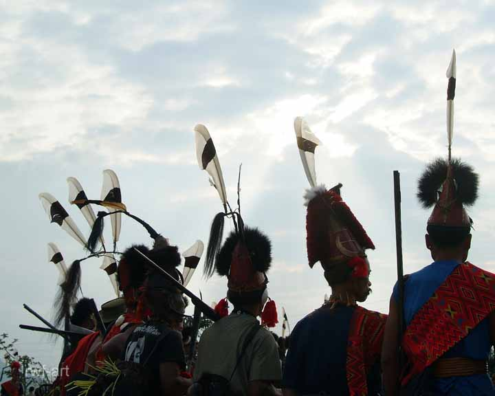 Konyakwarriors, Nagaland